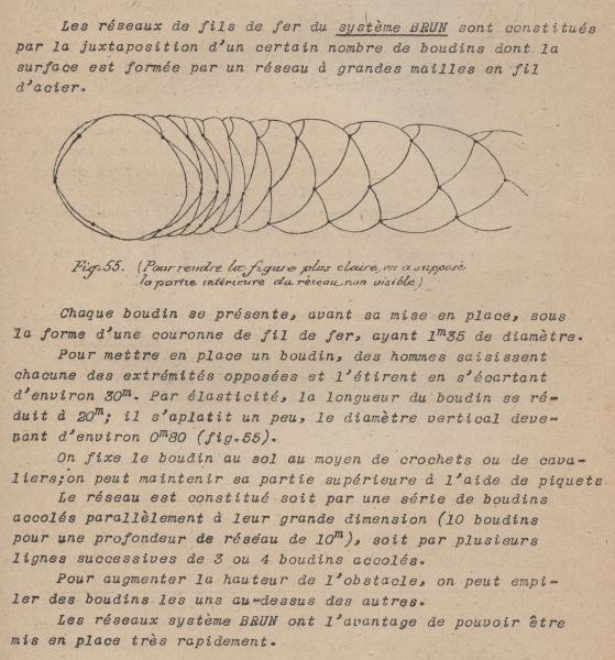 prise d'image personnelle d'un page d'archive libre de droit à disposition du public